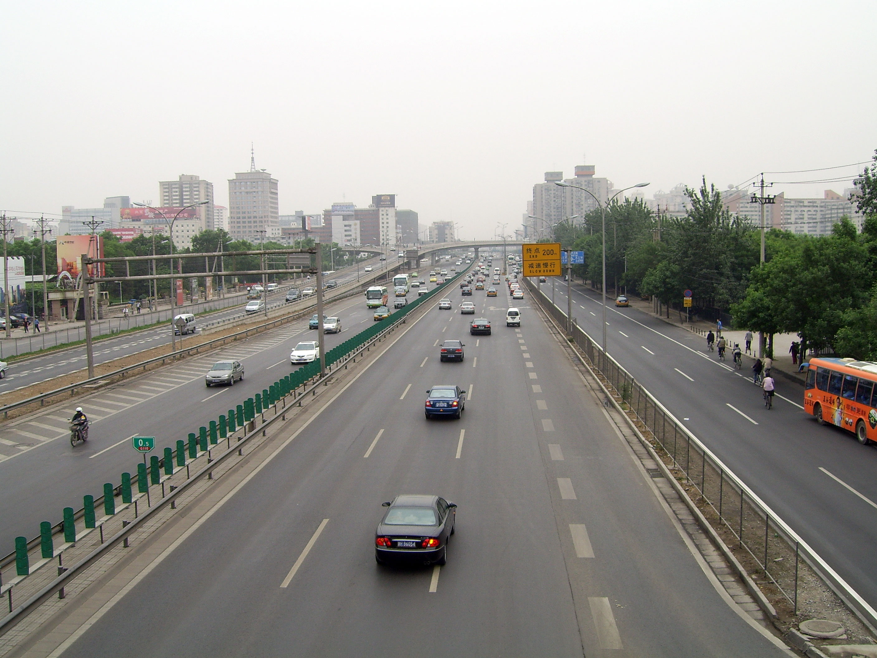 北京马甸的八达岭高速路